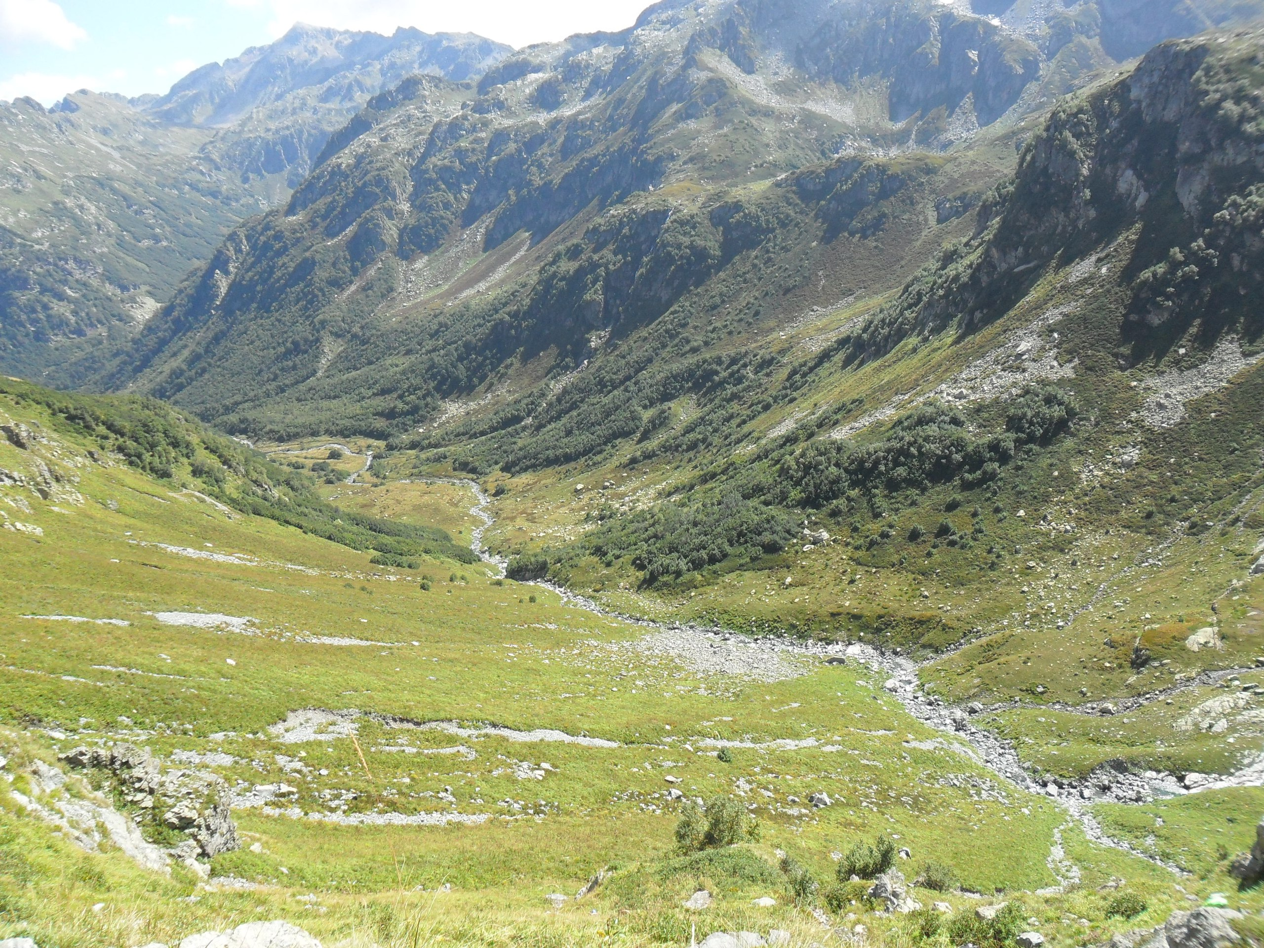 Верховья реки Макера, вид при подъёме на безымянный перевал в долину реки Дамхурц